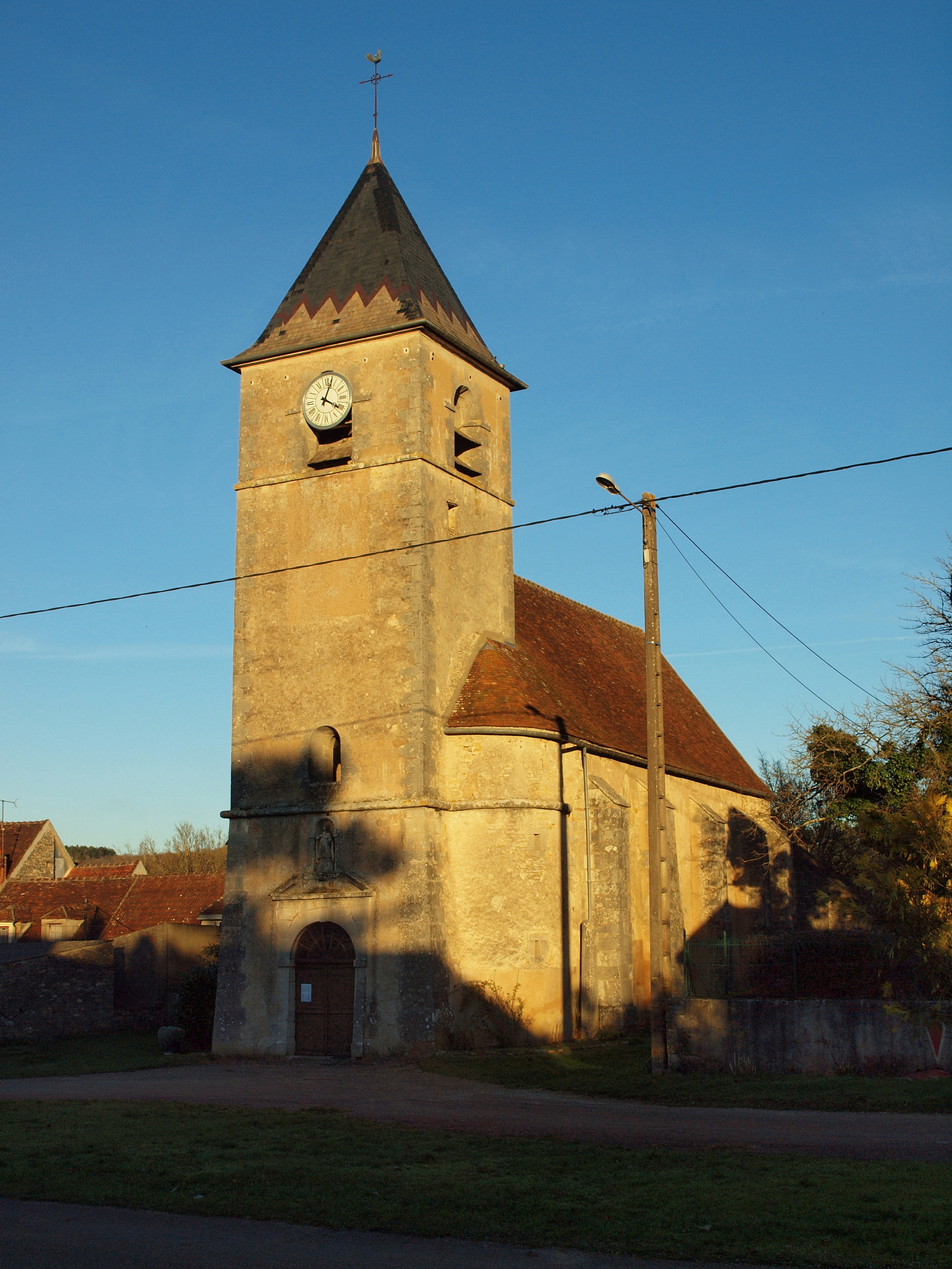 Asnières-sous-Bois (Yonne, France) ; église